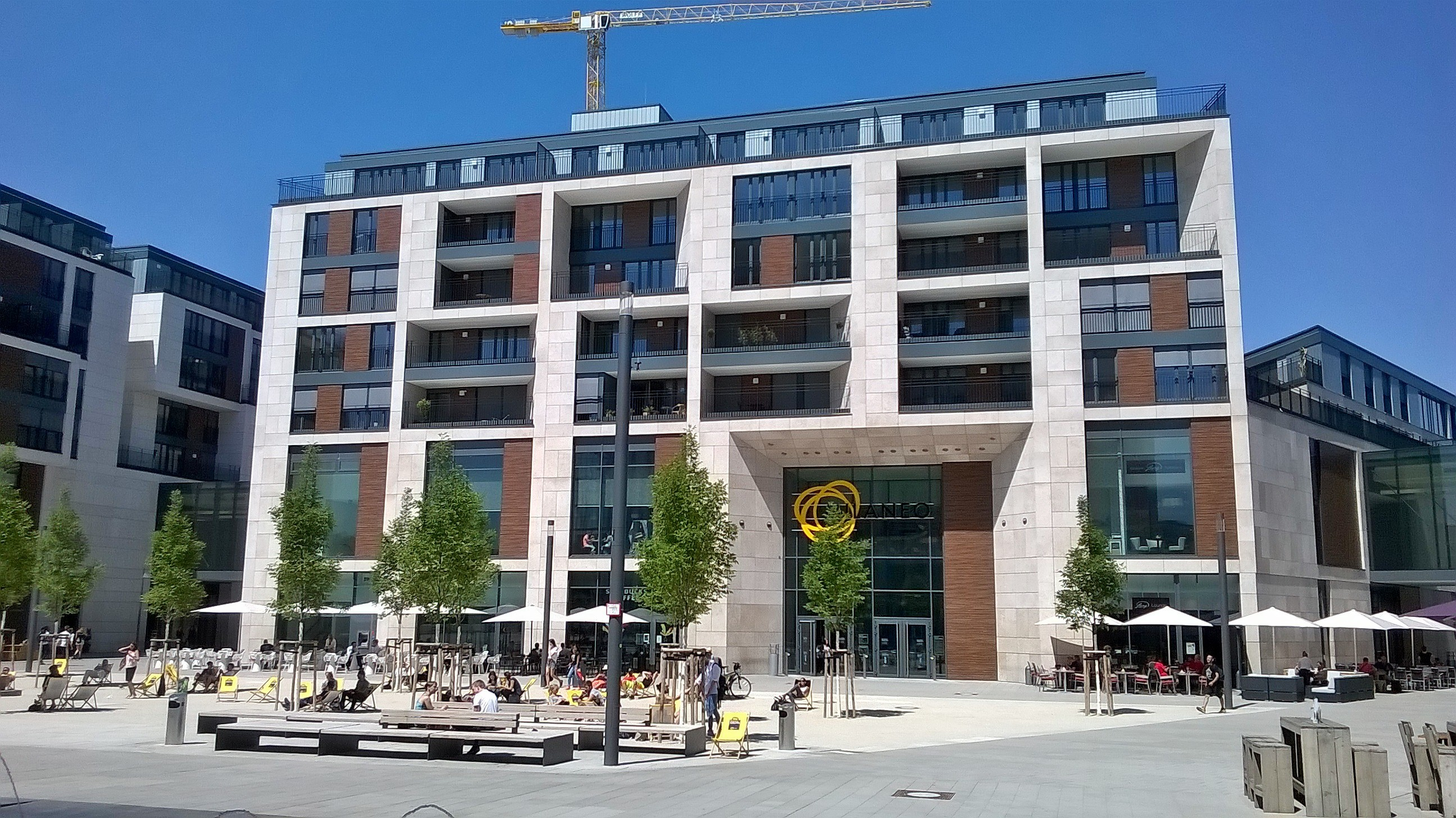 Außenansicht Milaneo (Juli 2015)